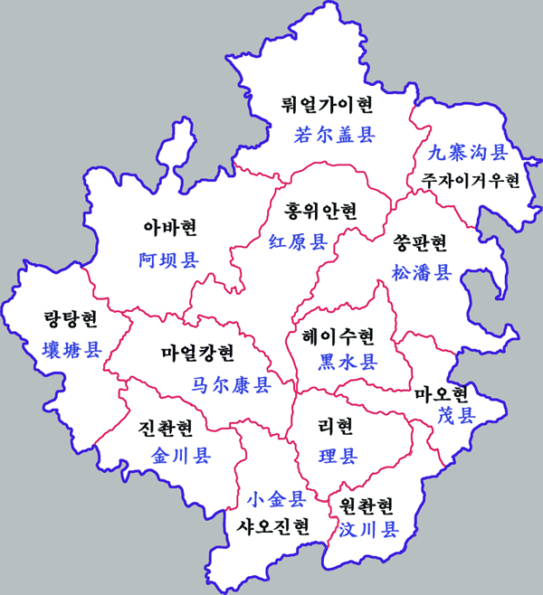 아바 자치주 현급구역도